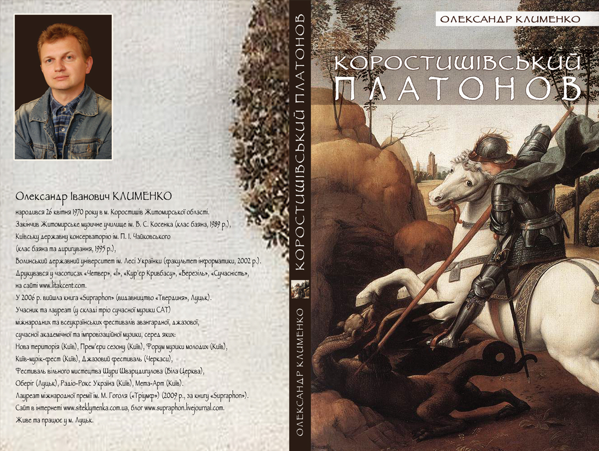 Обкладинка роману Олександра Клименка "Коростишівський Платонов" (видавництво "Ярославів Вал", 2010).